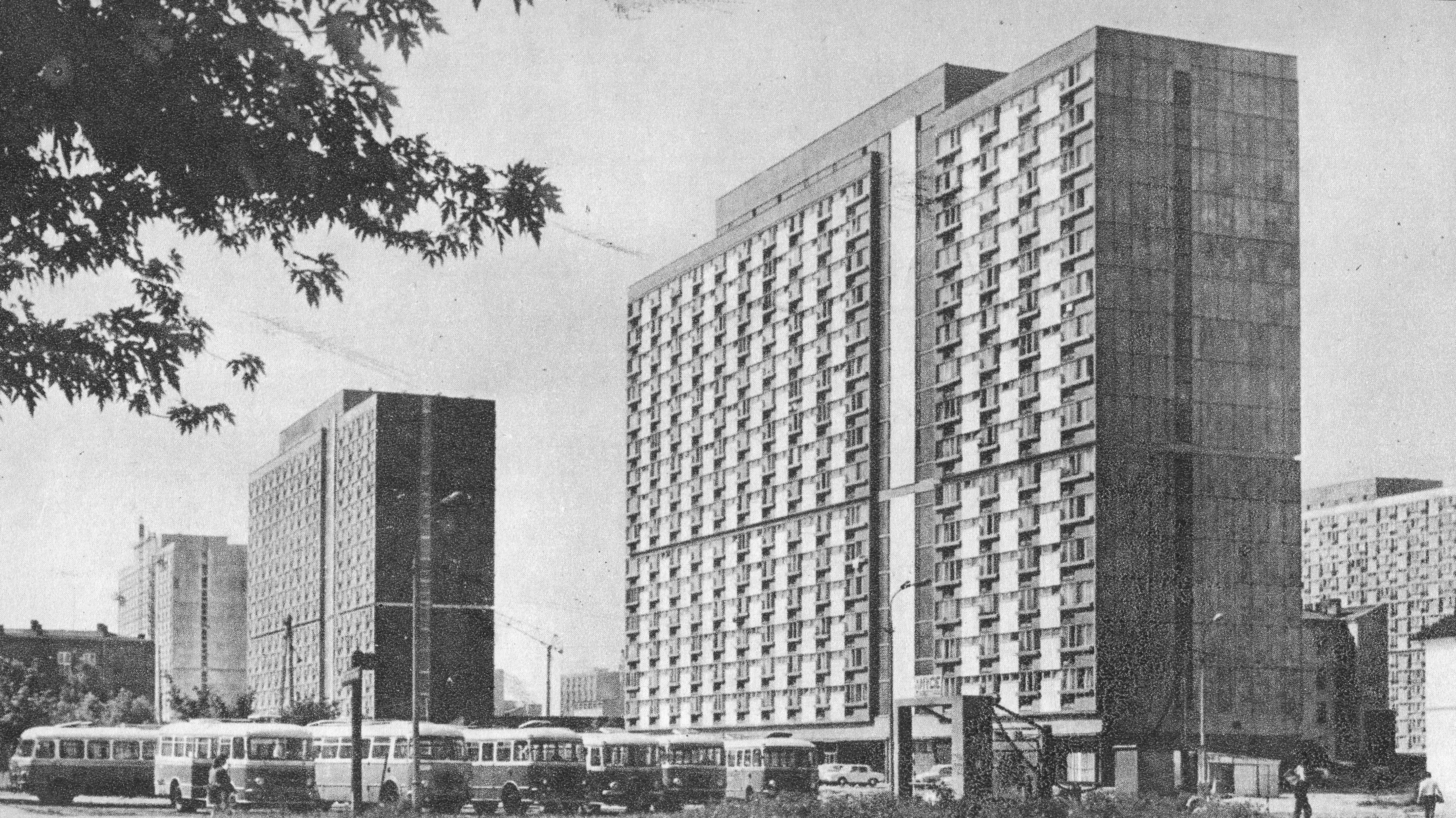 Bloki osiedla Za Żelazną Bramą przy al. Marchlewskiego (obecnie al. Jana Pawła II) i ul. Ciepłej